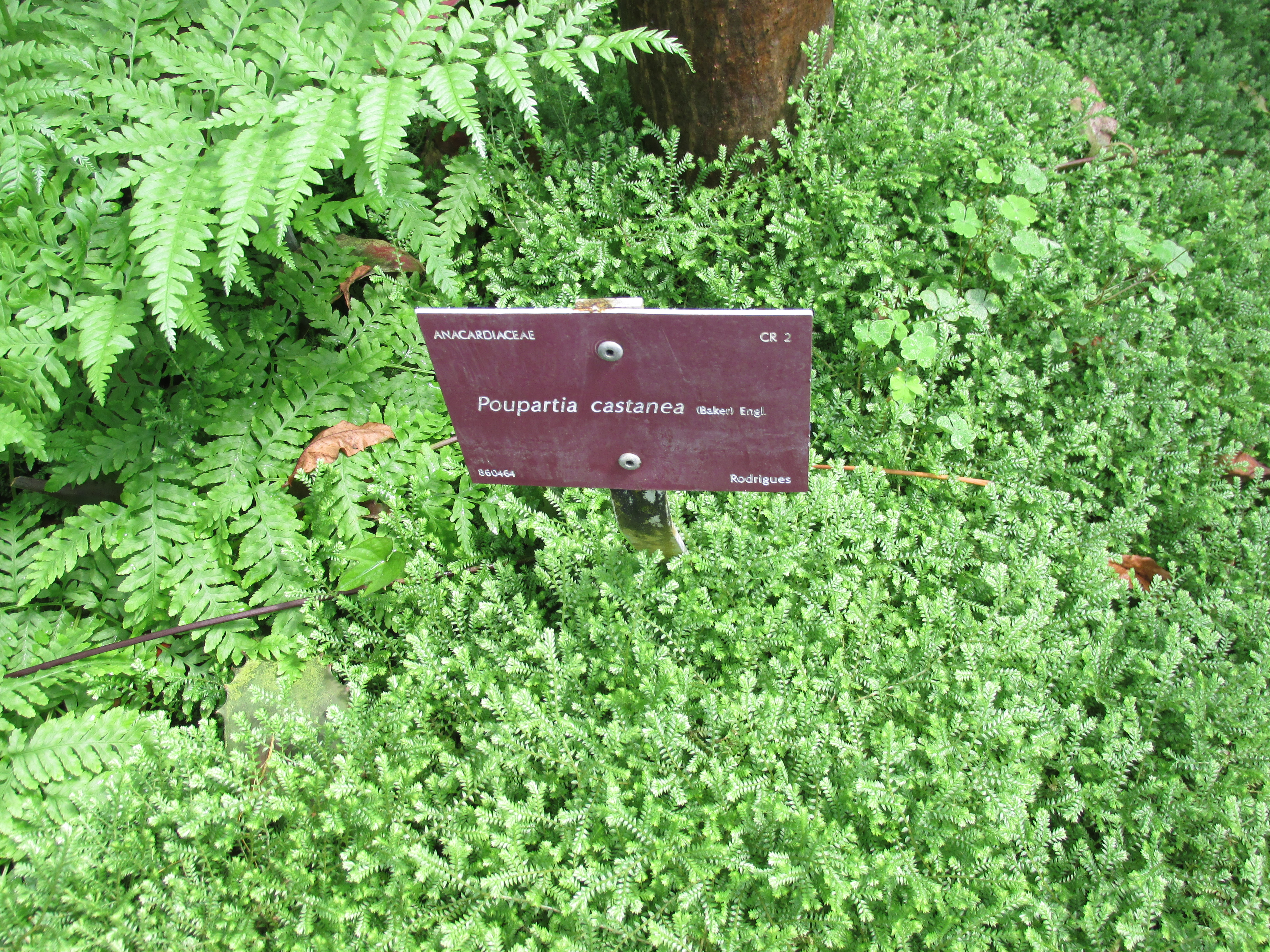 L'espèce "Poupartia castanea" dans les serres tropicales N°4 correspondant au climat forêts tropicales humides du Conservatoire Botanique National de Brest. Photo prise lors des journées contributives au Conservatoire Botanique National de Brest durant l'été 2015